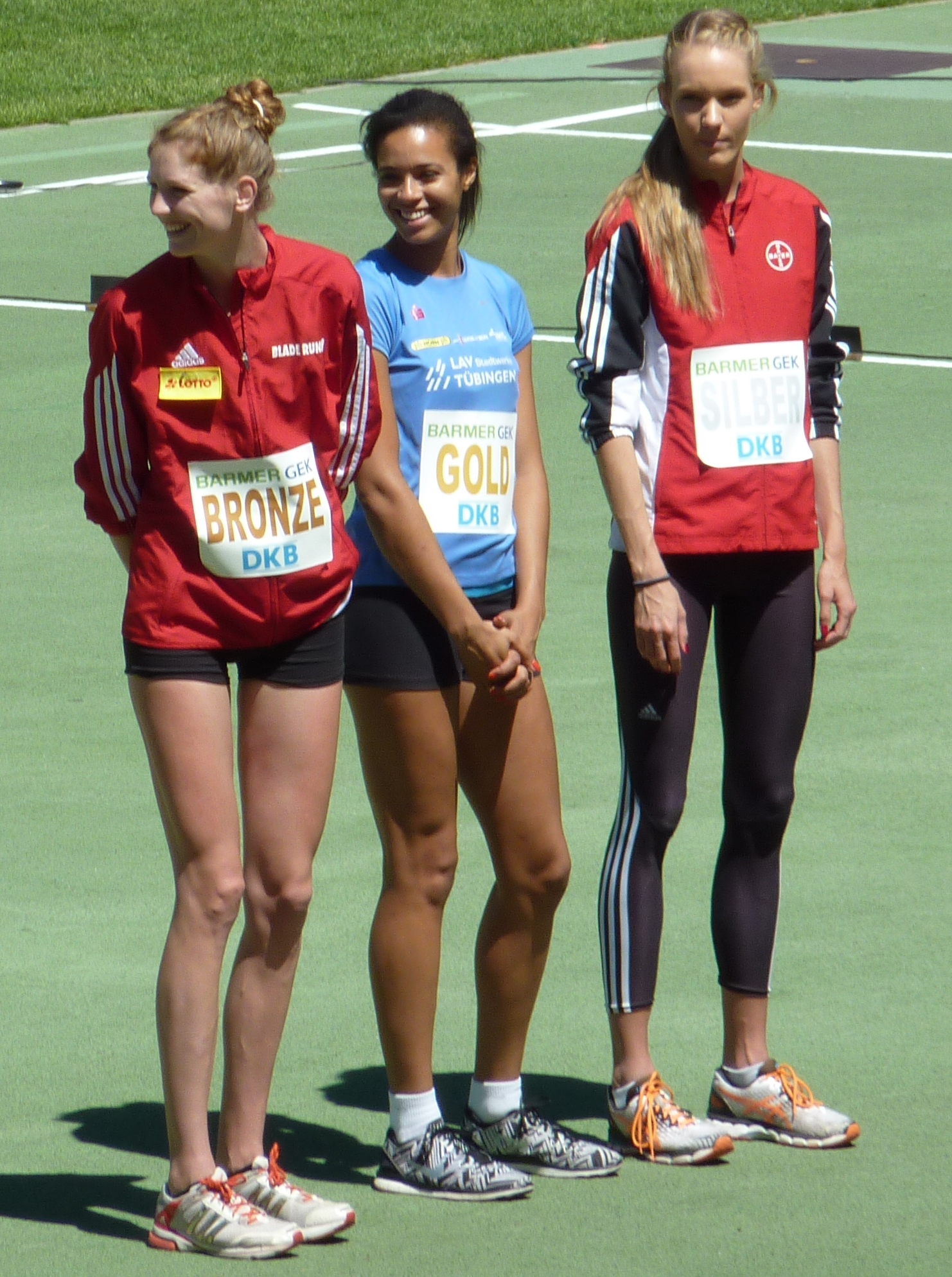 Siegerehrung im Hochsprung bei den Deutschen Meisterschaften 2015 in Nürnberg: Imke Onnen (links), Marie-Laurence Jungfleisch (Mitte), Katarina Mögenburg (rechts)